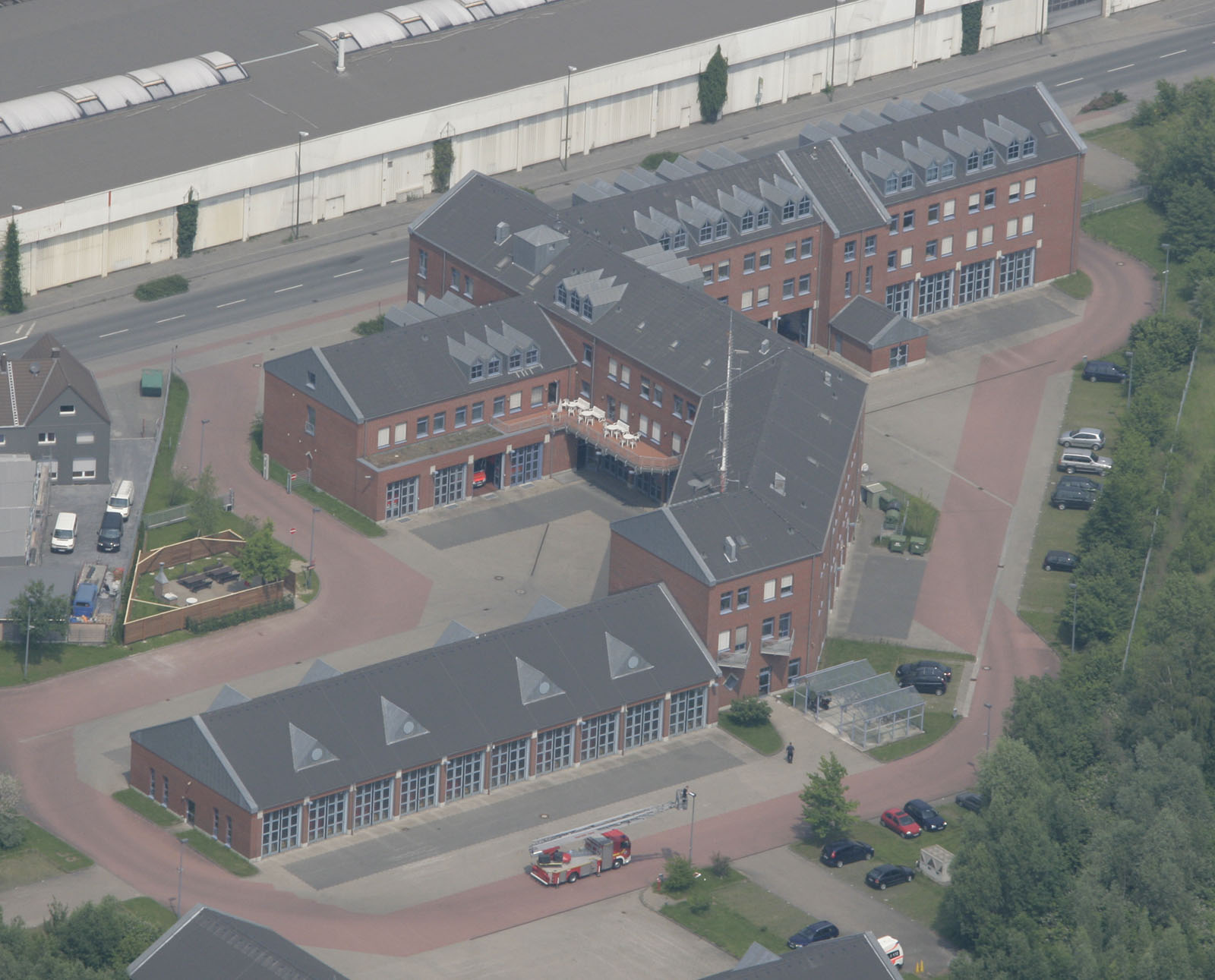 Luftbildaufnahme Hamm